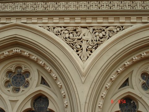 @ BMC Mumbai